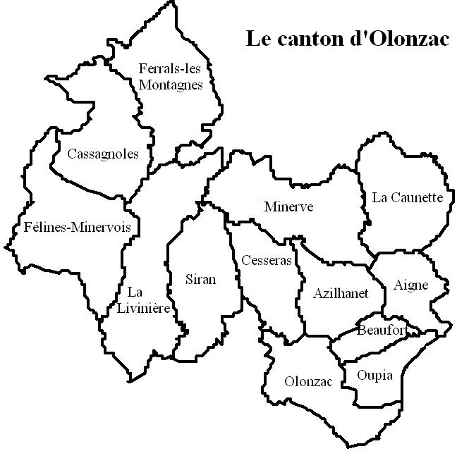 Le canton d'Olonzac Image personnelle